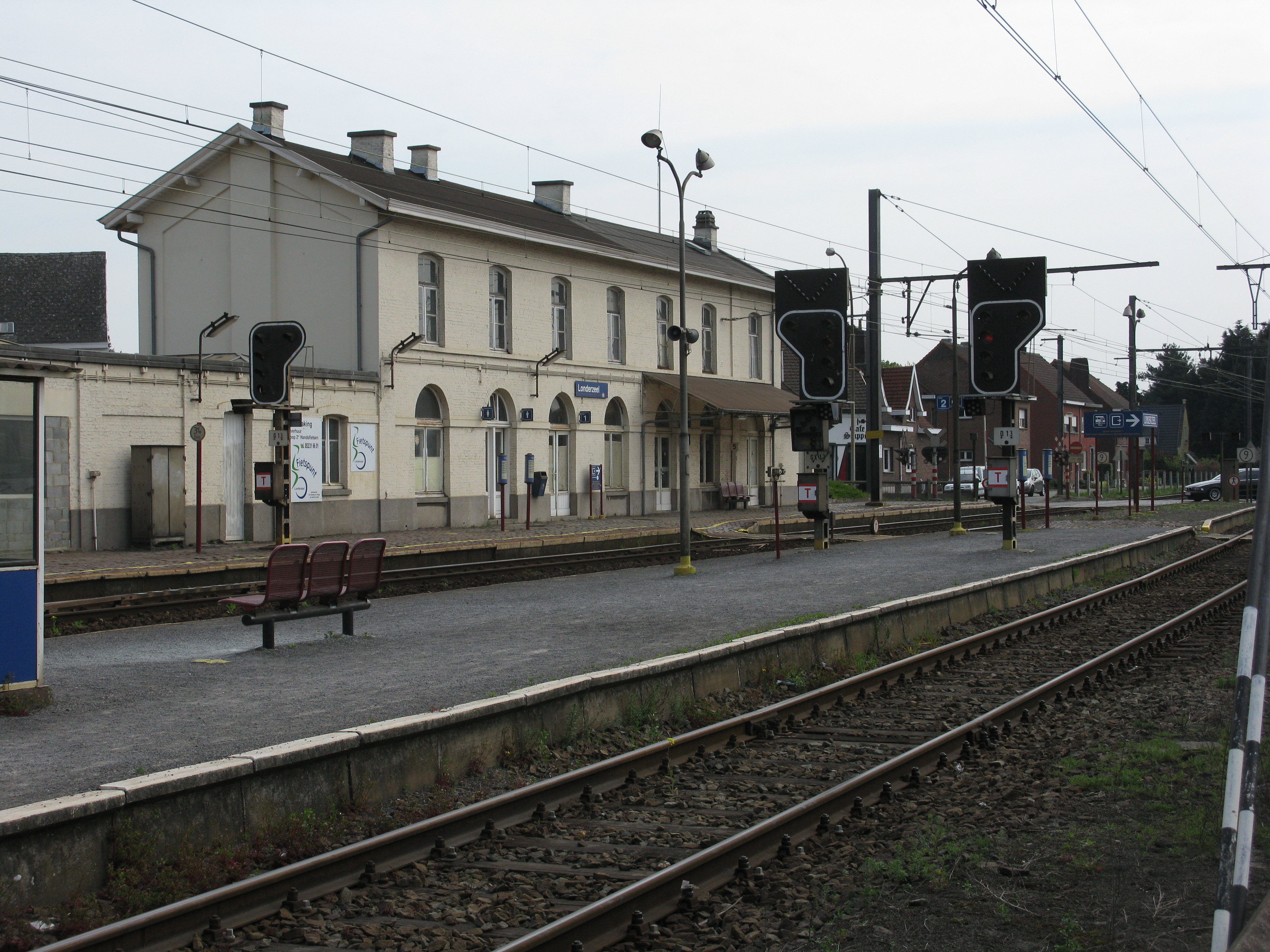 Station Londerzeel